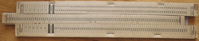 Datenschieber über zu erwartende Versicherungsjahre. "Aufgestellt von Th. Frantz, Verwaltungsoberinspektor bei der Landesversicherungsanstalt Hannover". Der Datenschieber ist aus Pappe.